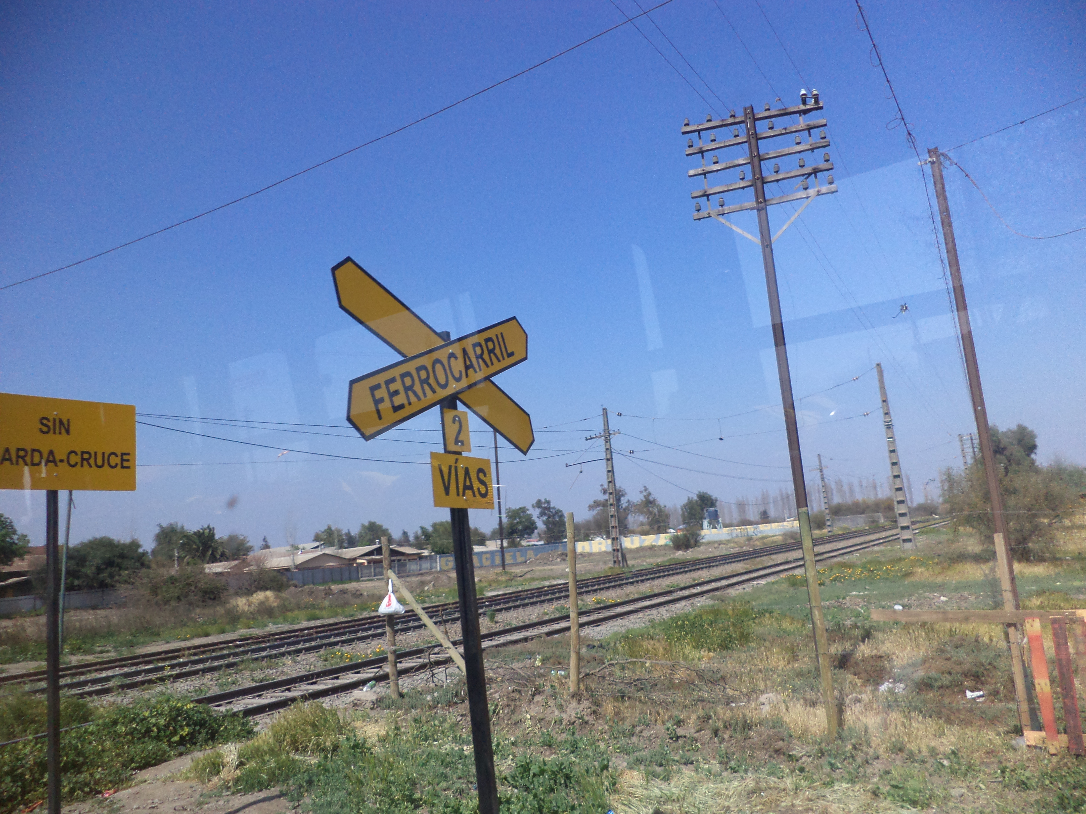 Estación ferroviaria abandonada de Batuco, comuna de Lampa, provincia de Chacabuco, Chile